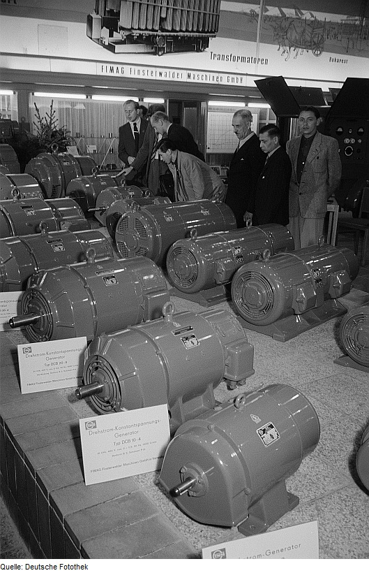 Original image description from the Deutsche Fotothek Drehstrom-Konstantspannungsgeneratoren Typ DBC 20-4 der Finsterwalder Maschinen GmbH FIMAG auf der Leipziger Herbstmesse 1954